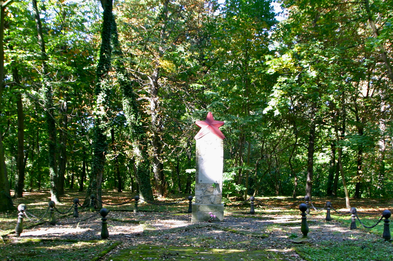 Głogówek (dodatkowa nazwa w j. niem. Oberglogau) – miasto w Polsce położone na Górnym Śląsku, w województwie opolskim, w powiecie prudnickim.